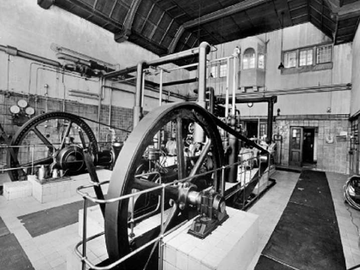 Schwungräder der MAN-Linde-Eiskühlanlage im Schlachthof Bad Kissingen